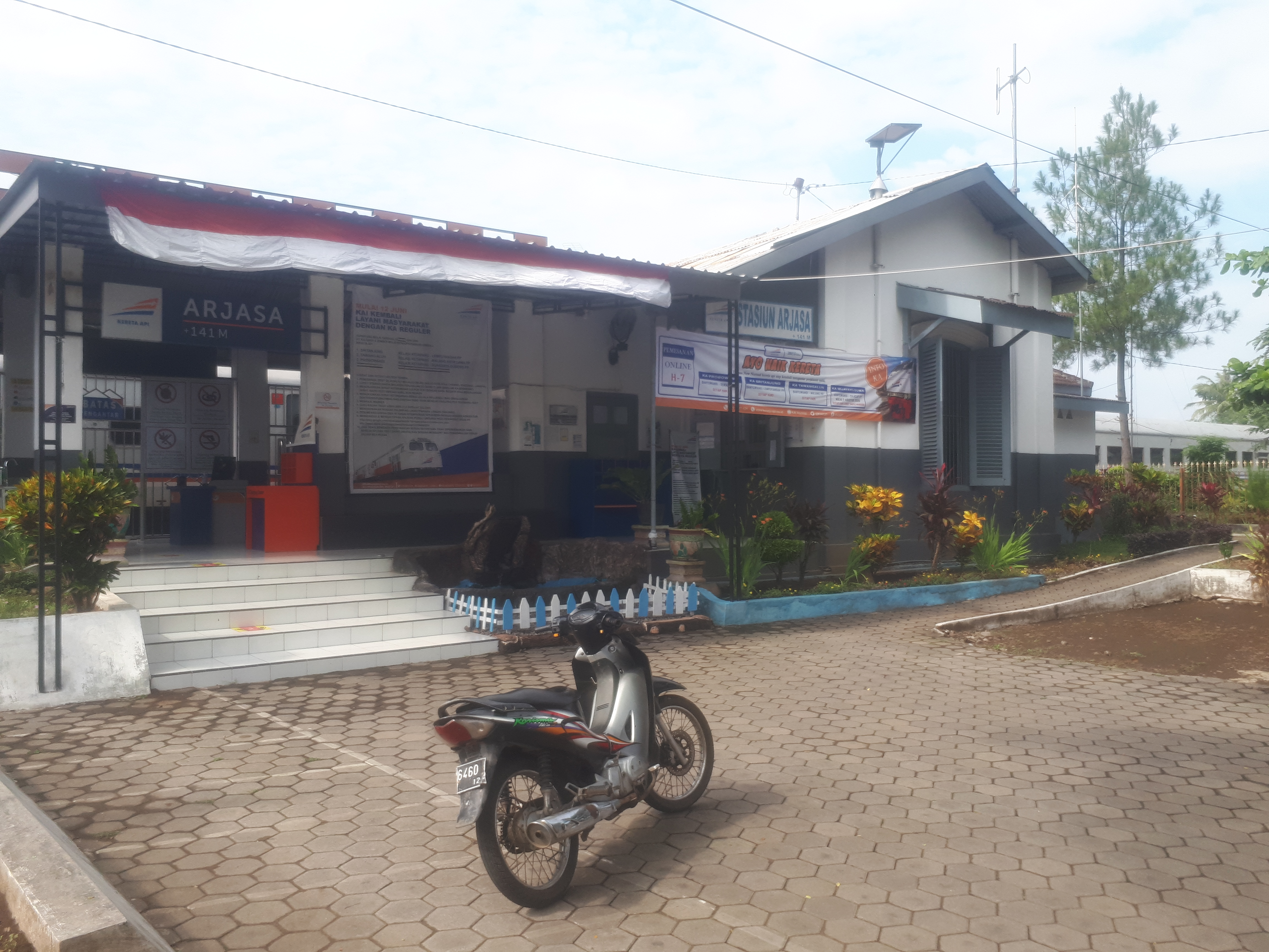 Tampak depan Stasiun Arjasa, 2020